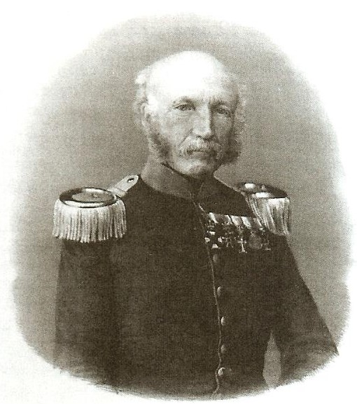 Oberstleutnant Carl Georg Behrens, Kommandeur des Lübecker Bataillons in der Oldenburgisch-Hanseatischen Brigade